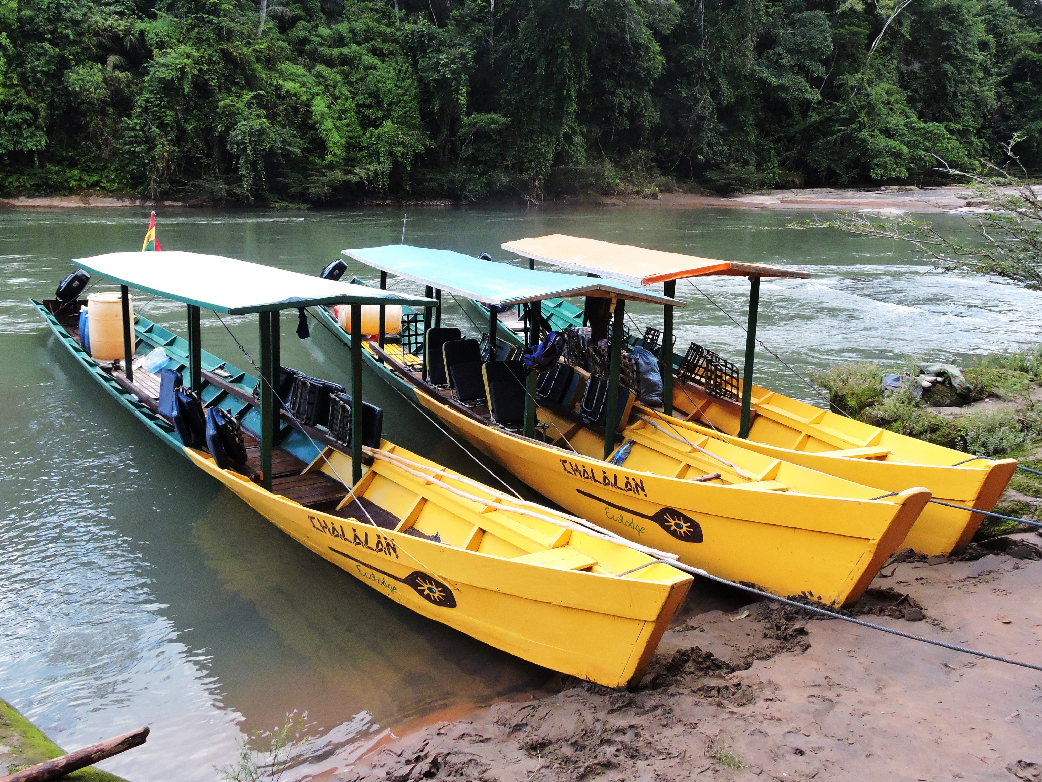 Botes de Chalalan para el viaje de Rurrenabaque al albergue